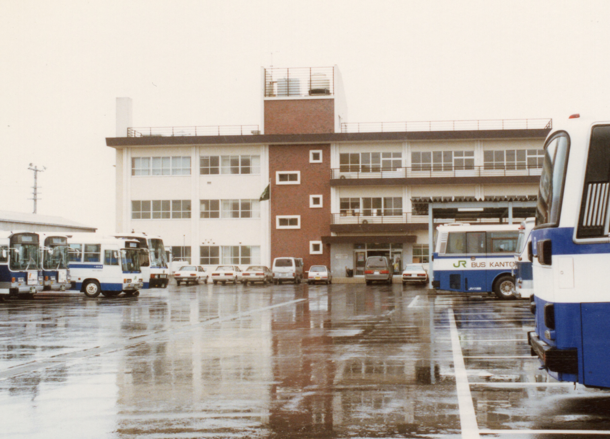 水戸支店